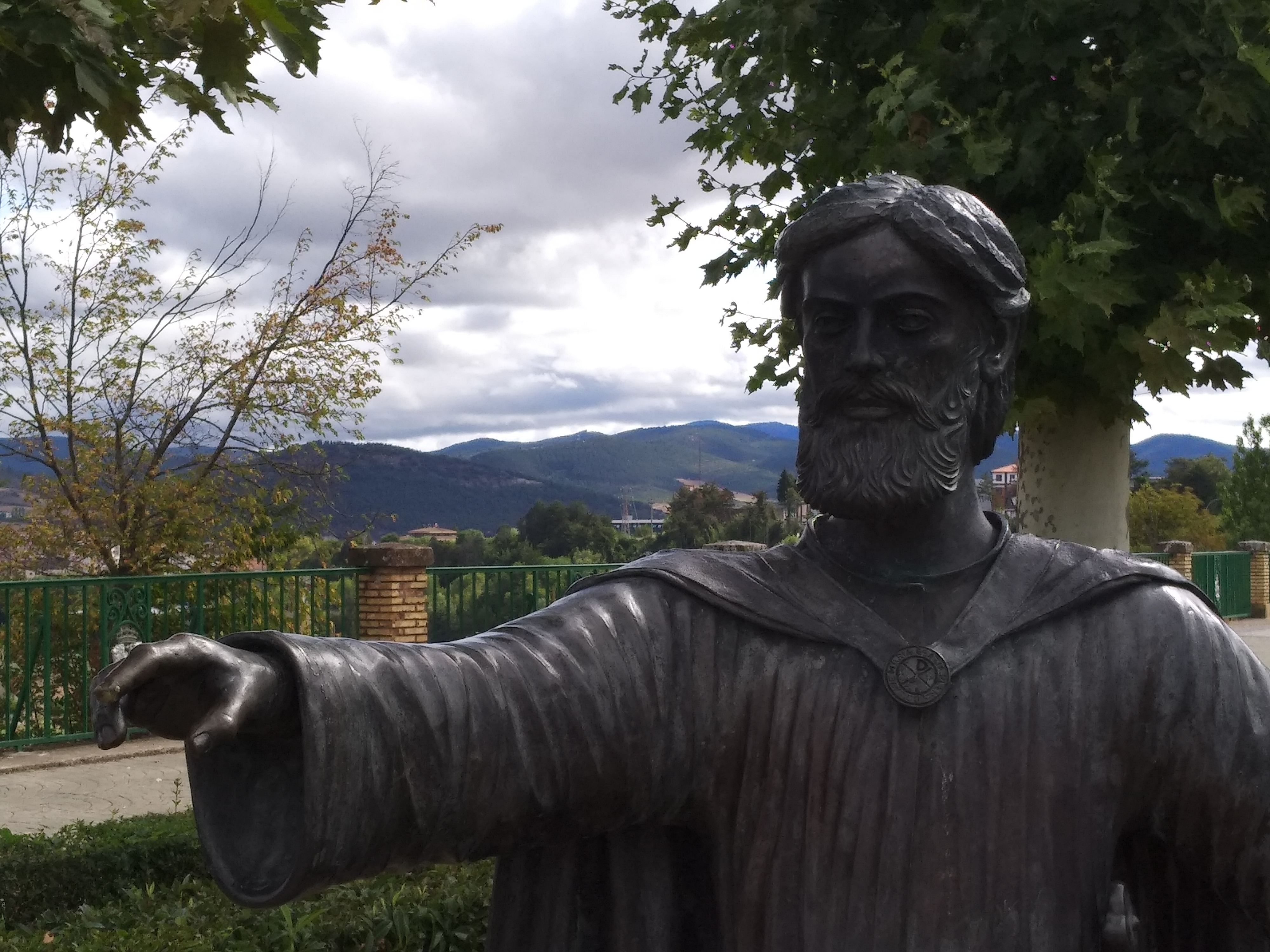 Monumento dedicado a Sancho III el Mayor (Pamplona)